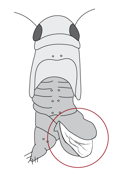 Schemazeichnung: Zikadenlarve mit Dryiniden-Säckchen (Zikadenwespenbefall)